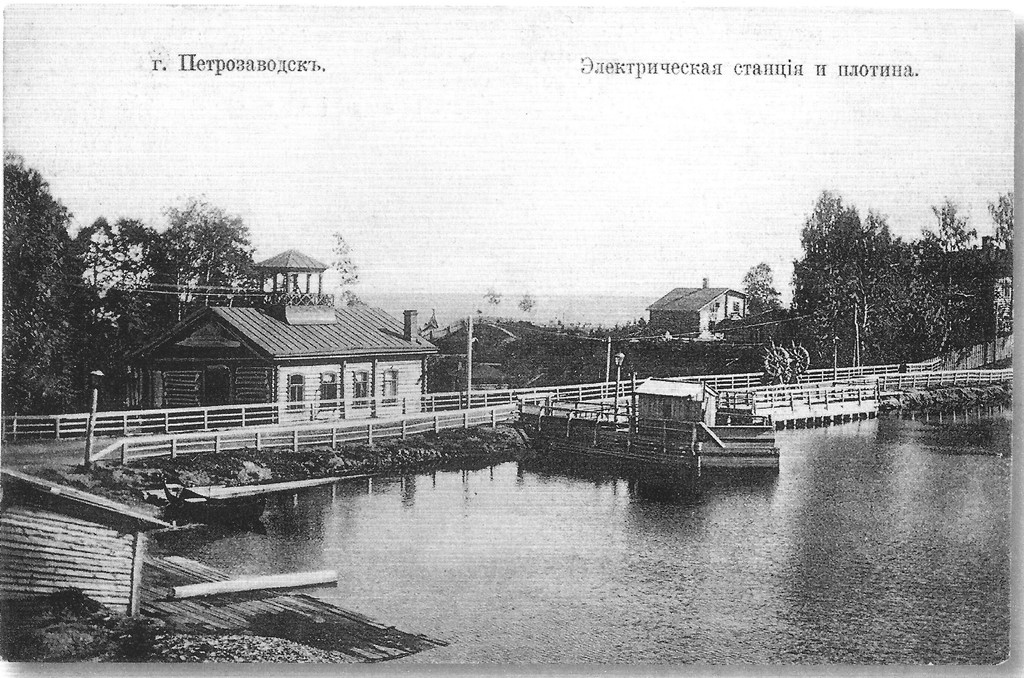 Эл.станция и плотина на р.Лососинка